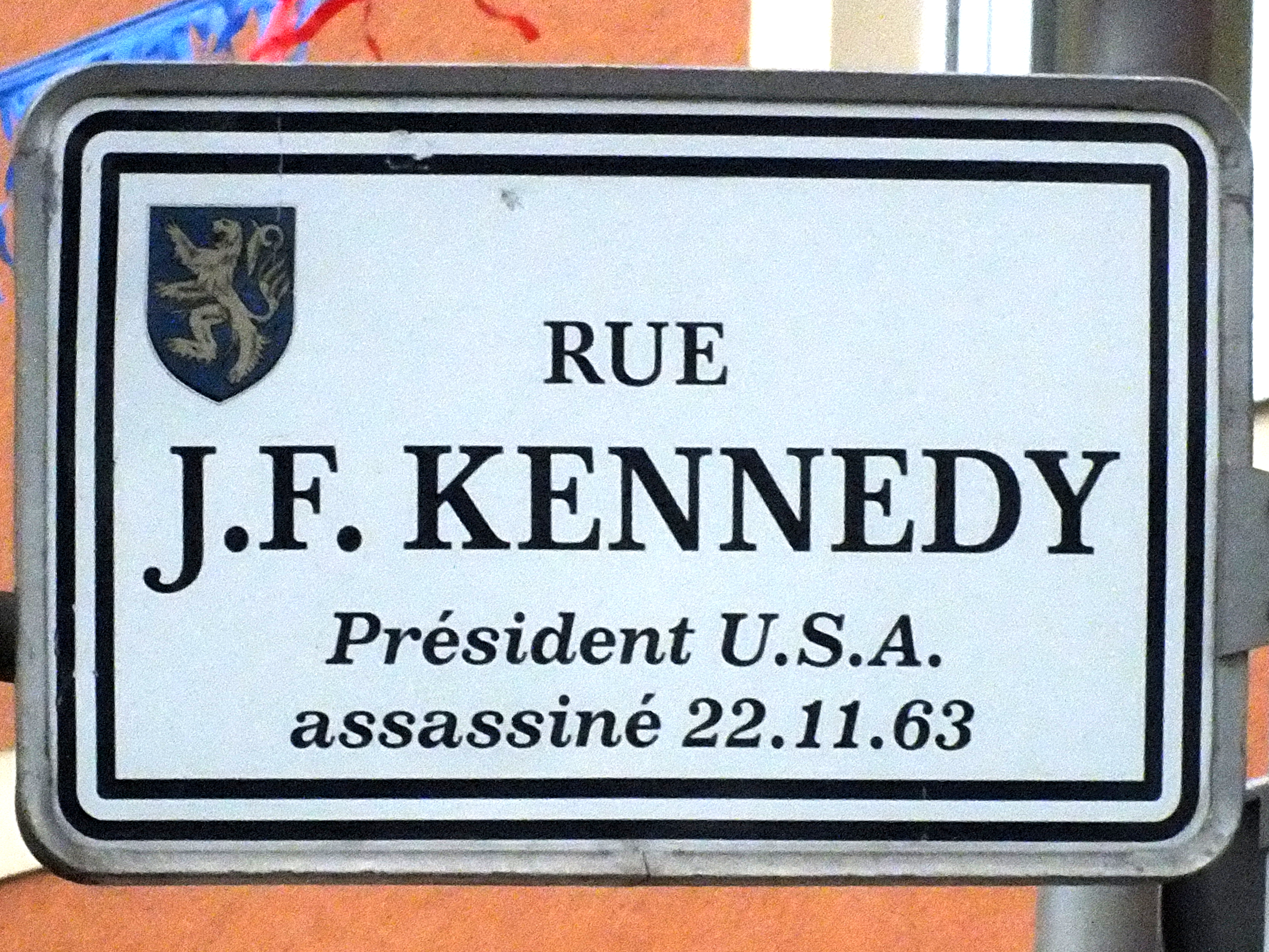 Stroosseschëld zu Déifferdeng.